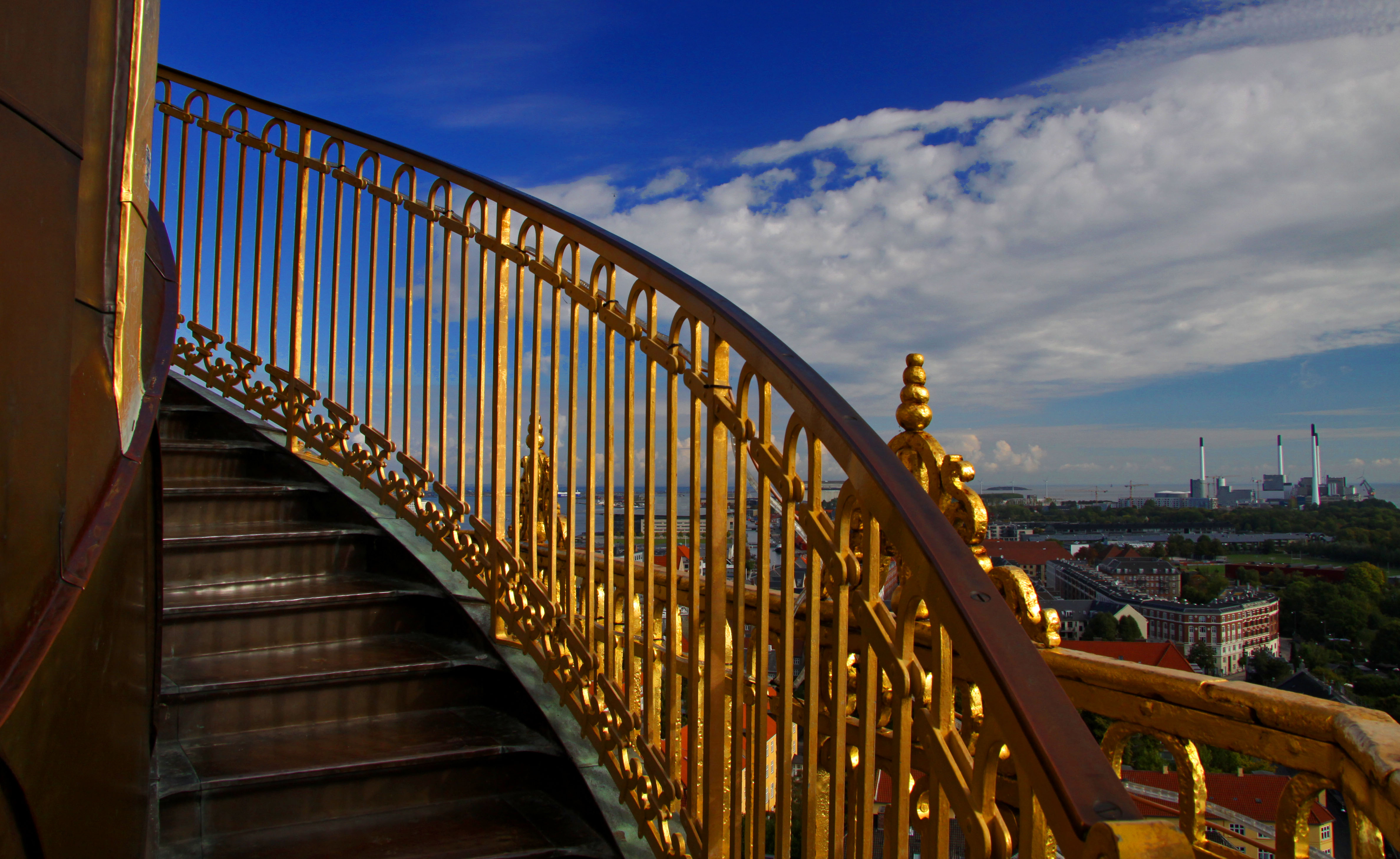 Vor Frelser Kirke in Copenhagen, Denmark